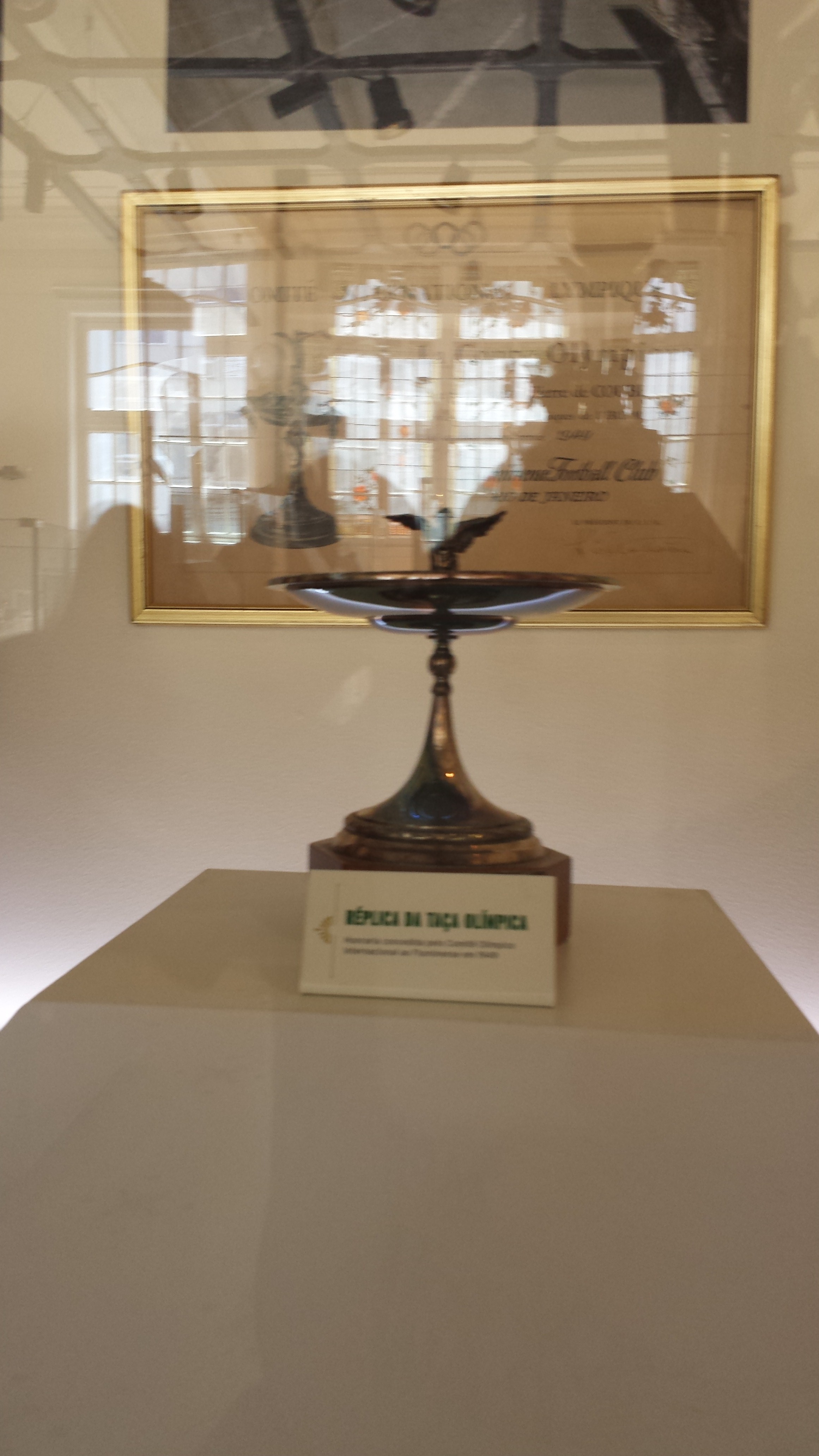 Réplica da Taça Olímpica de 1949 em exposição no Fluminense Football Club.